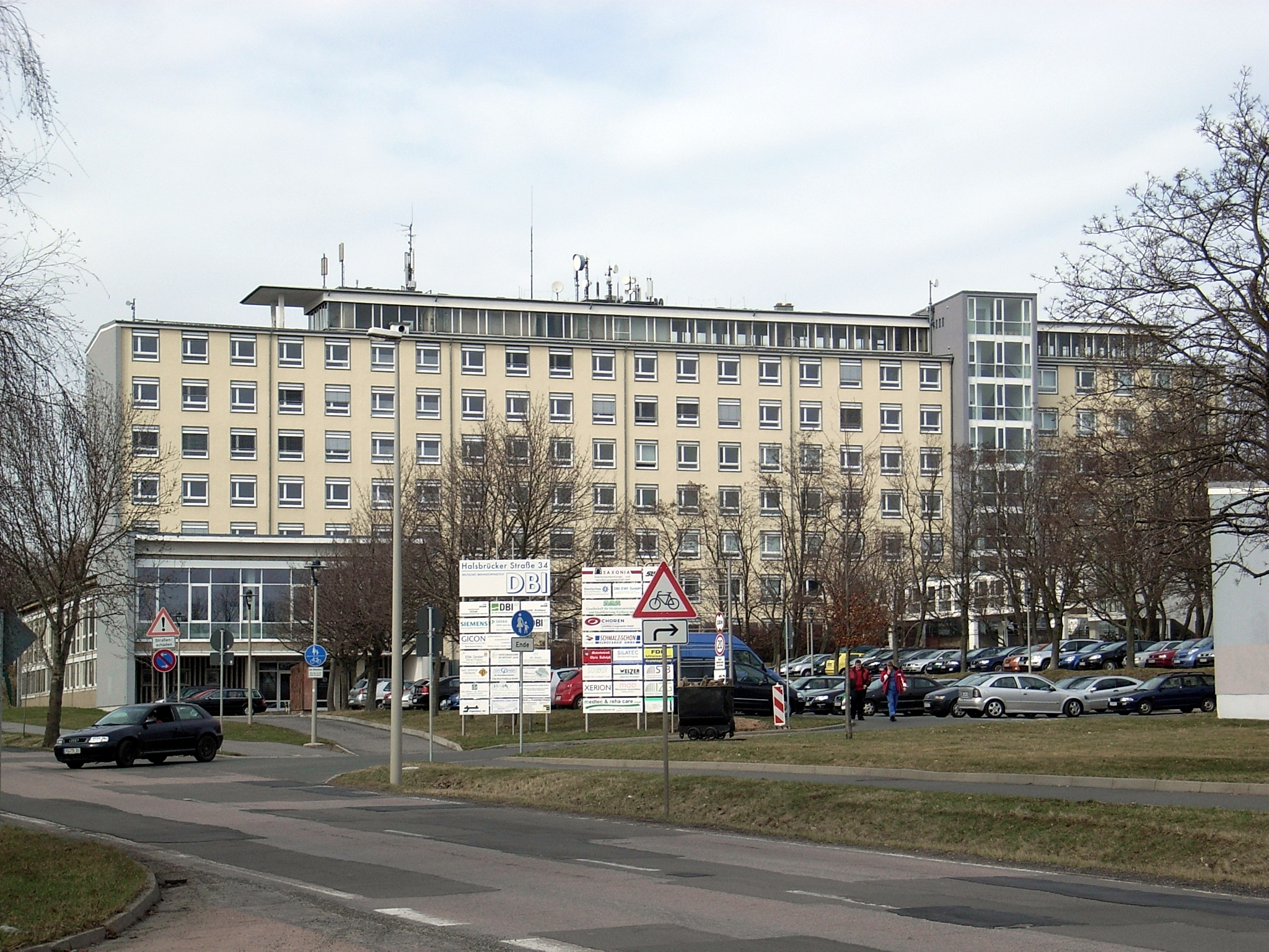 BSI Freiberg